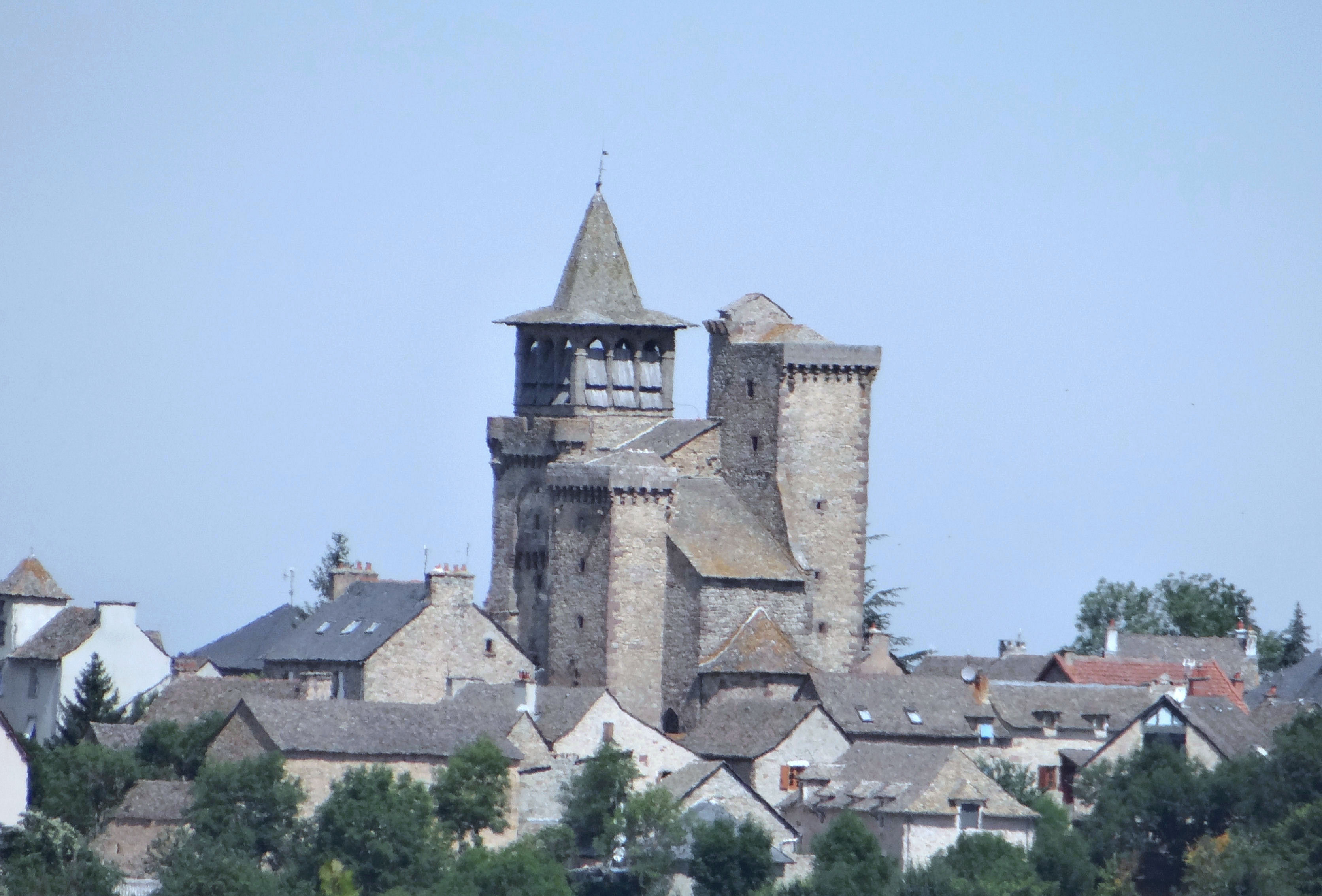 Sainte-Radegonde - Église fortifiée de Sainte-Radegonde et les toits du village .